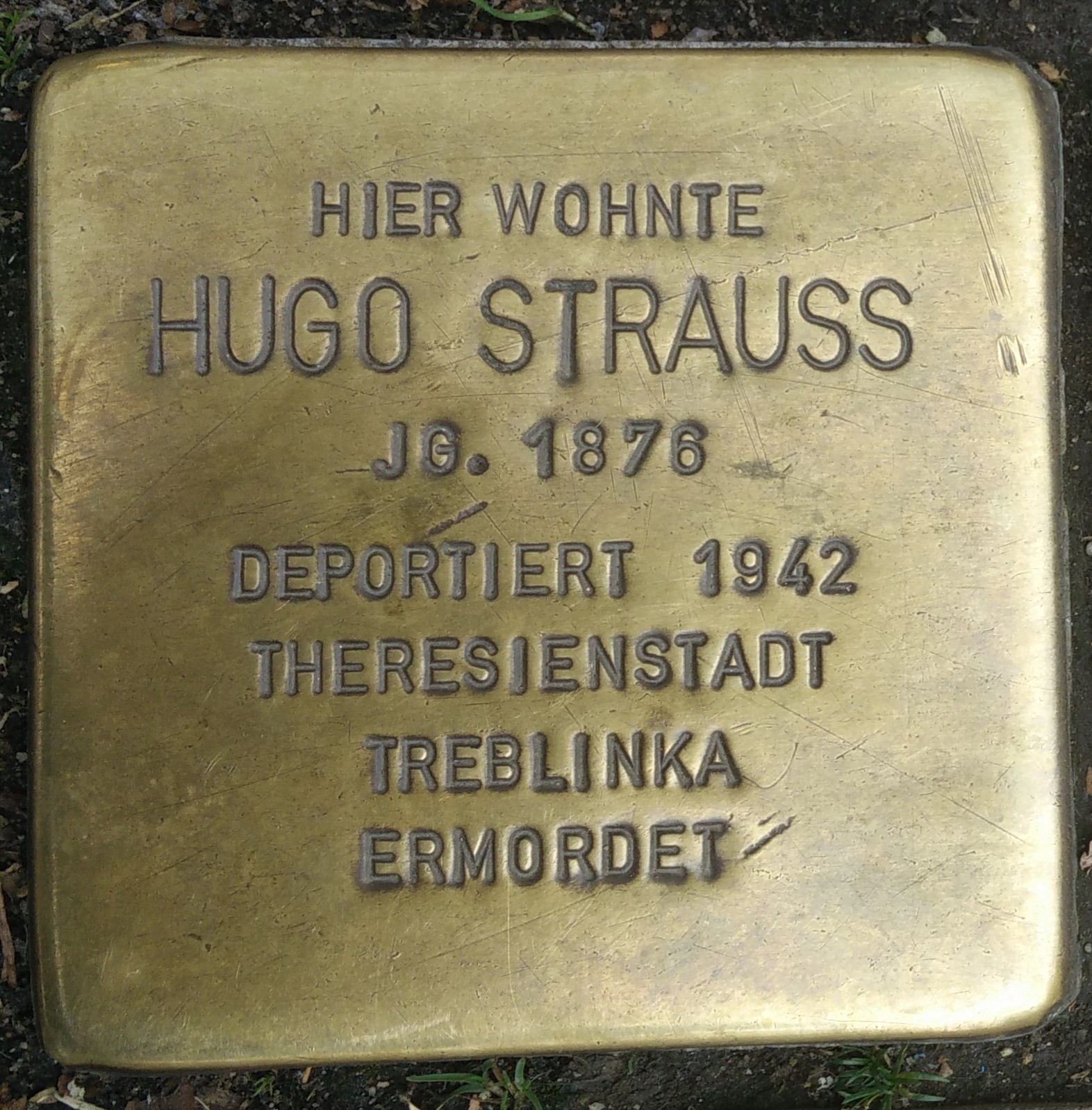 Bad Vilbel, Stolperstein Hugo Strauss